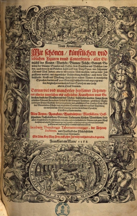 Tabernaemontanus, Neuw Kreuterbuch title page